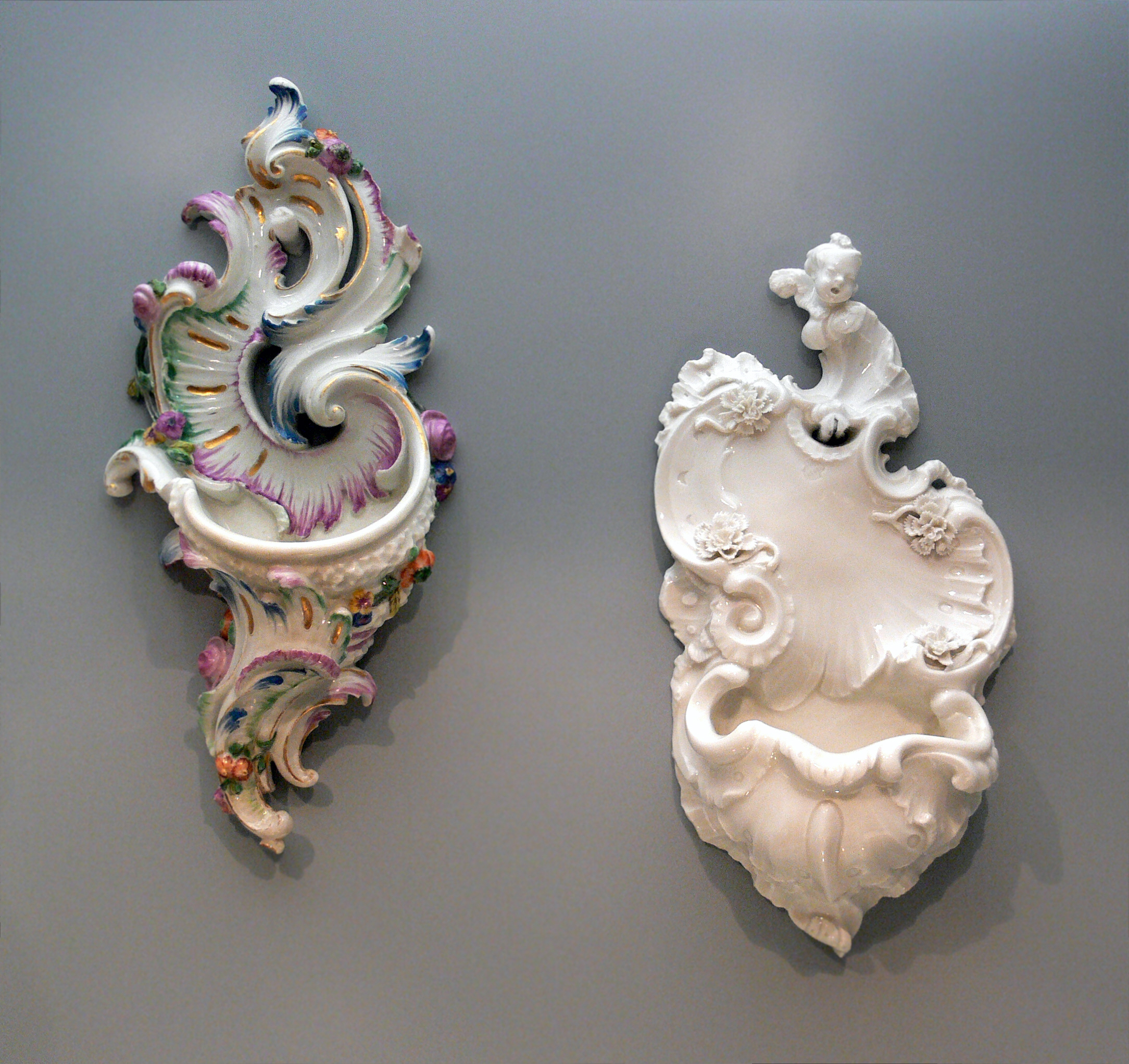 Zwei Weihwasserbecken Porzellanmanufaktur Nymphenburg, um 1760, Modell wohl von Franz Anton Bustelli Bayerisches Nationalmuseum München